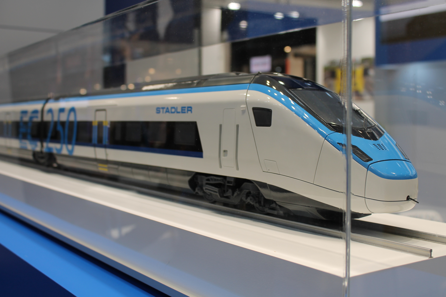 Model elektrycznego zespołu trakcyjnego dużych prędkości Stadler EC250 prezentowany podczas Trako 2015. The making of this document was supported by Wikimedia Polska Association, within Wikigrant no. WG 2015-34.